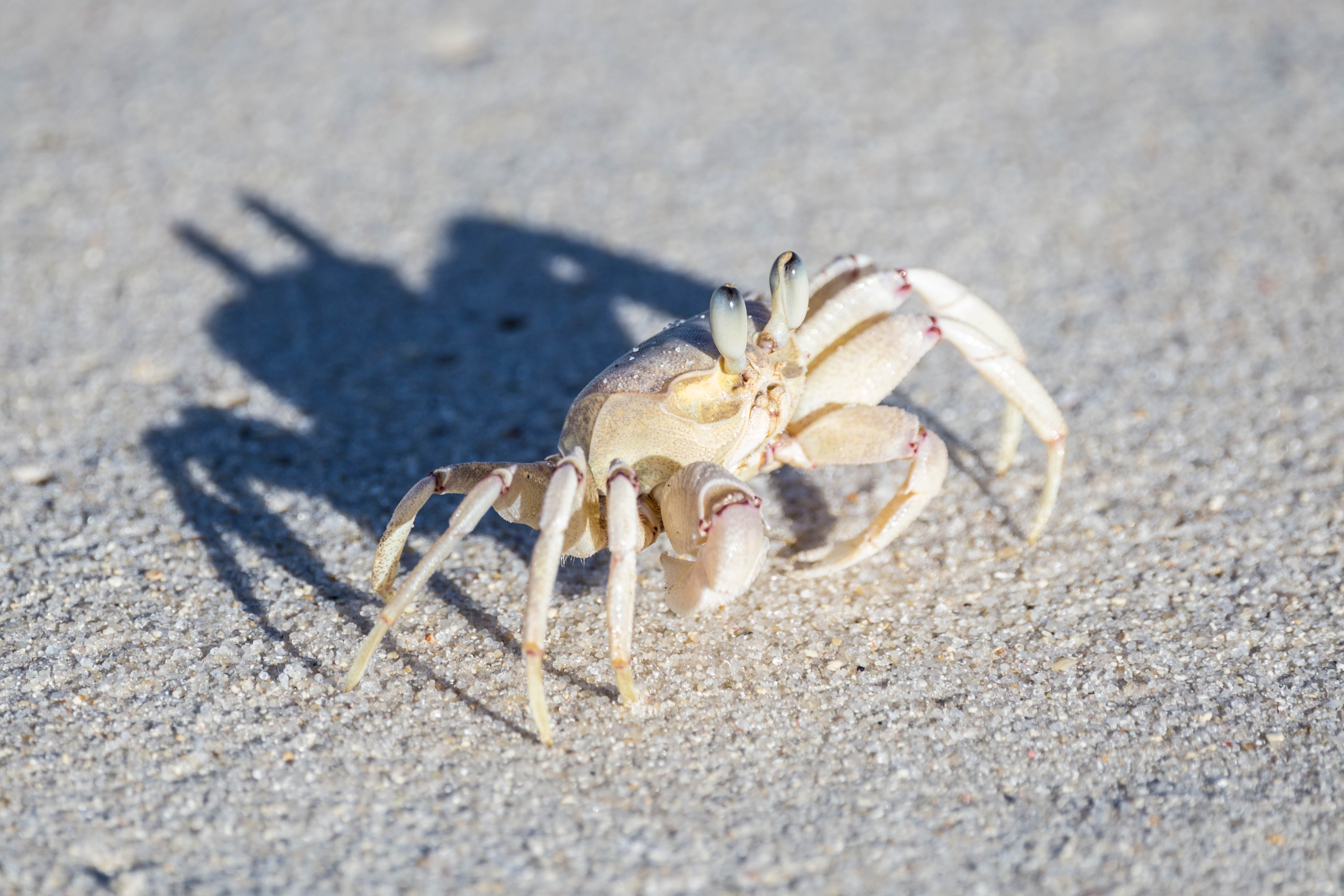 In den Abendstunden kommen Krebse aus ihren Verstecken.